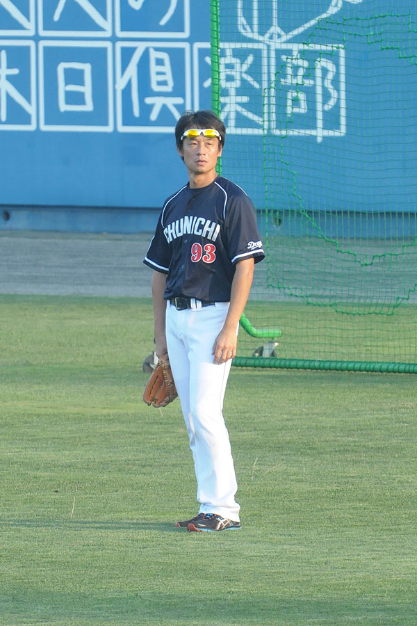 中日ドラゴンズ、宮前岳巳コーチ。こまちスタジアムで。